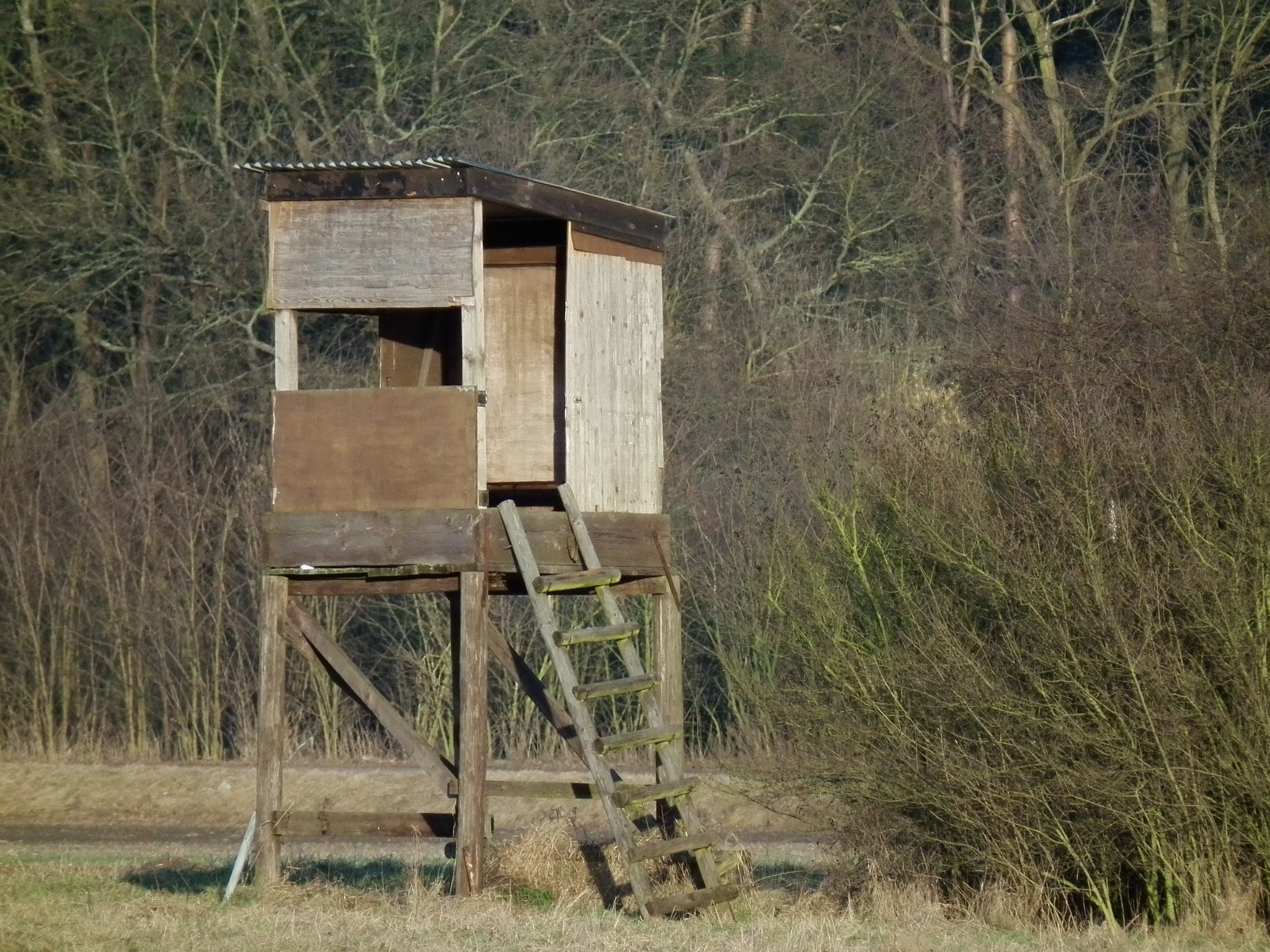 Kompakter Hochsitz im Brunnenfeld zwischen Mannheim-Rheinau und Mannheim-Friedrichsfeld (Baden-Württemberg, Deutschland)